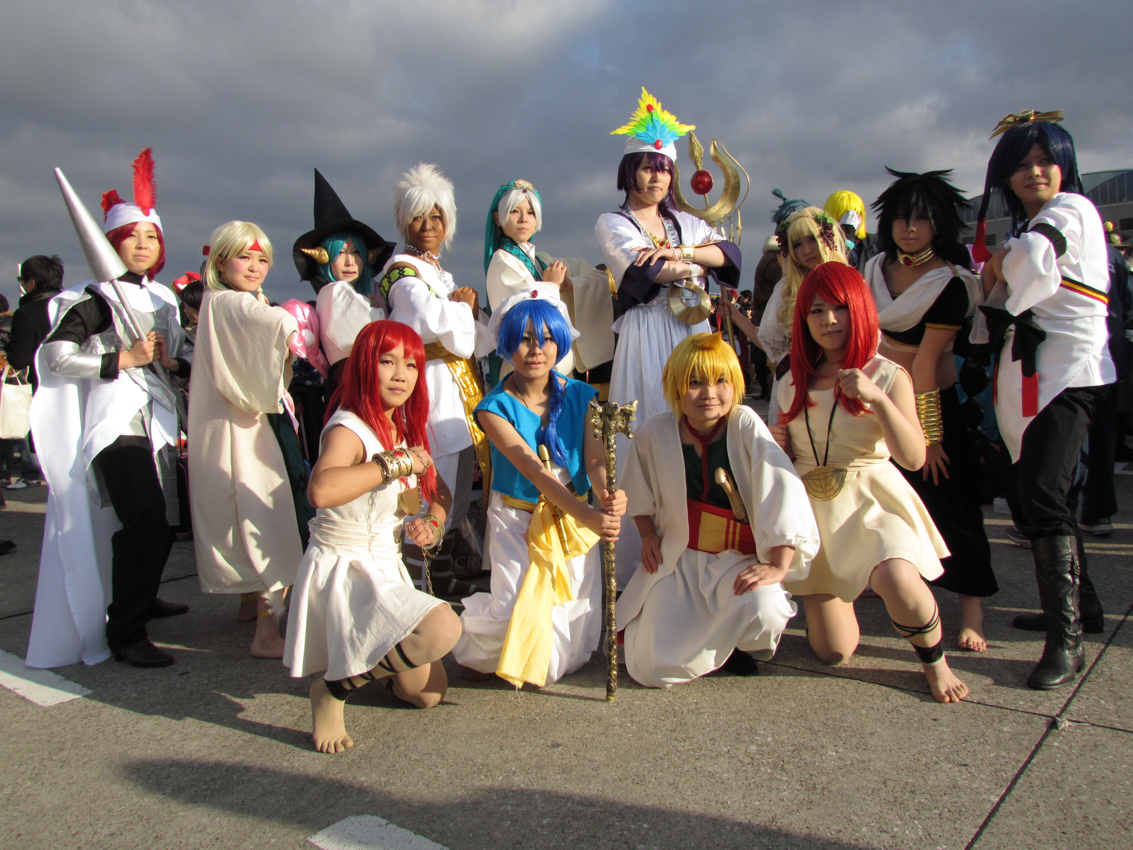 Cosplay en Comiket 83